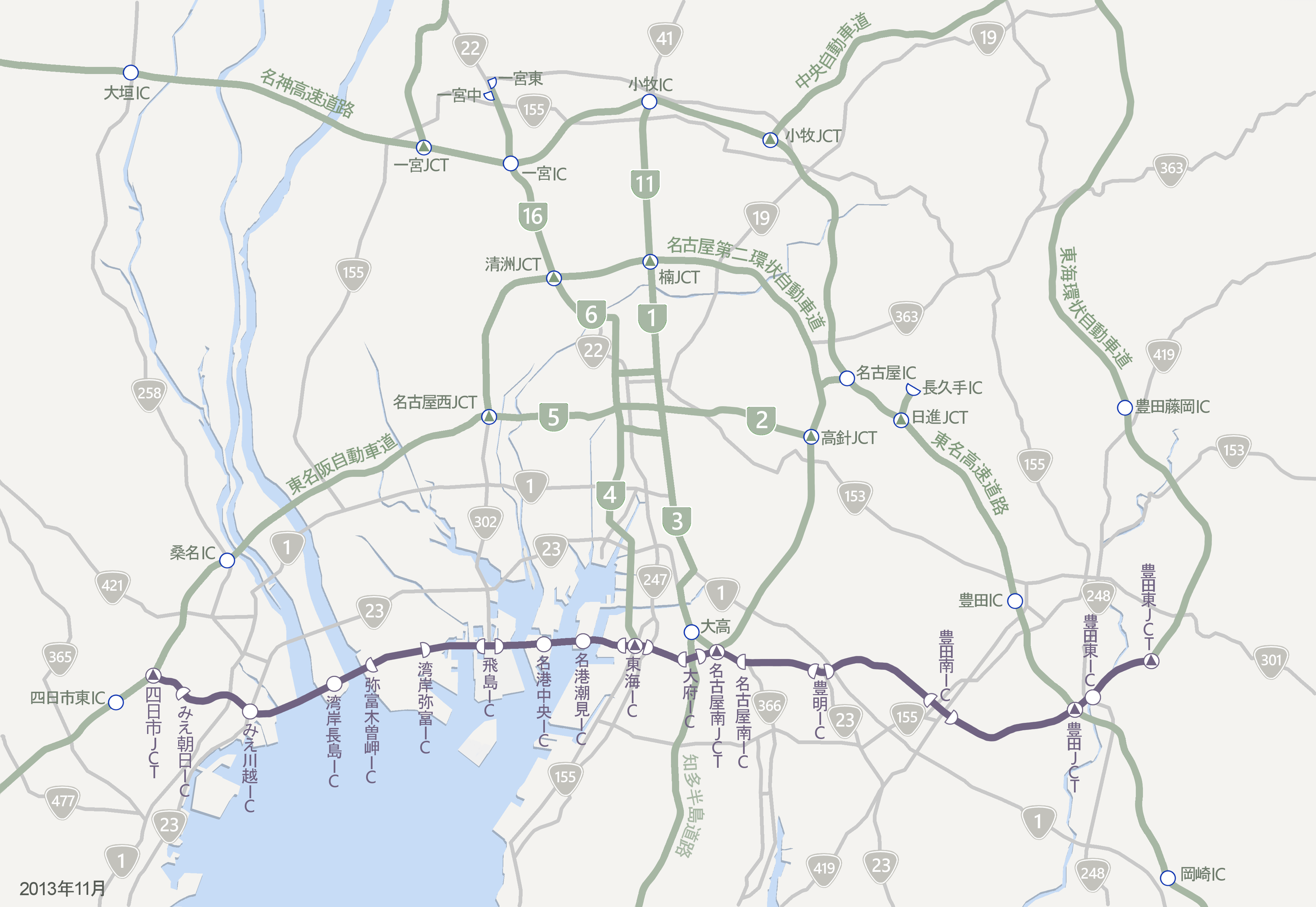 伊勢湾岸自動車道2013年11月時点